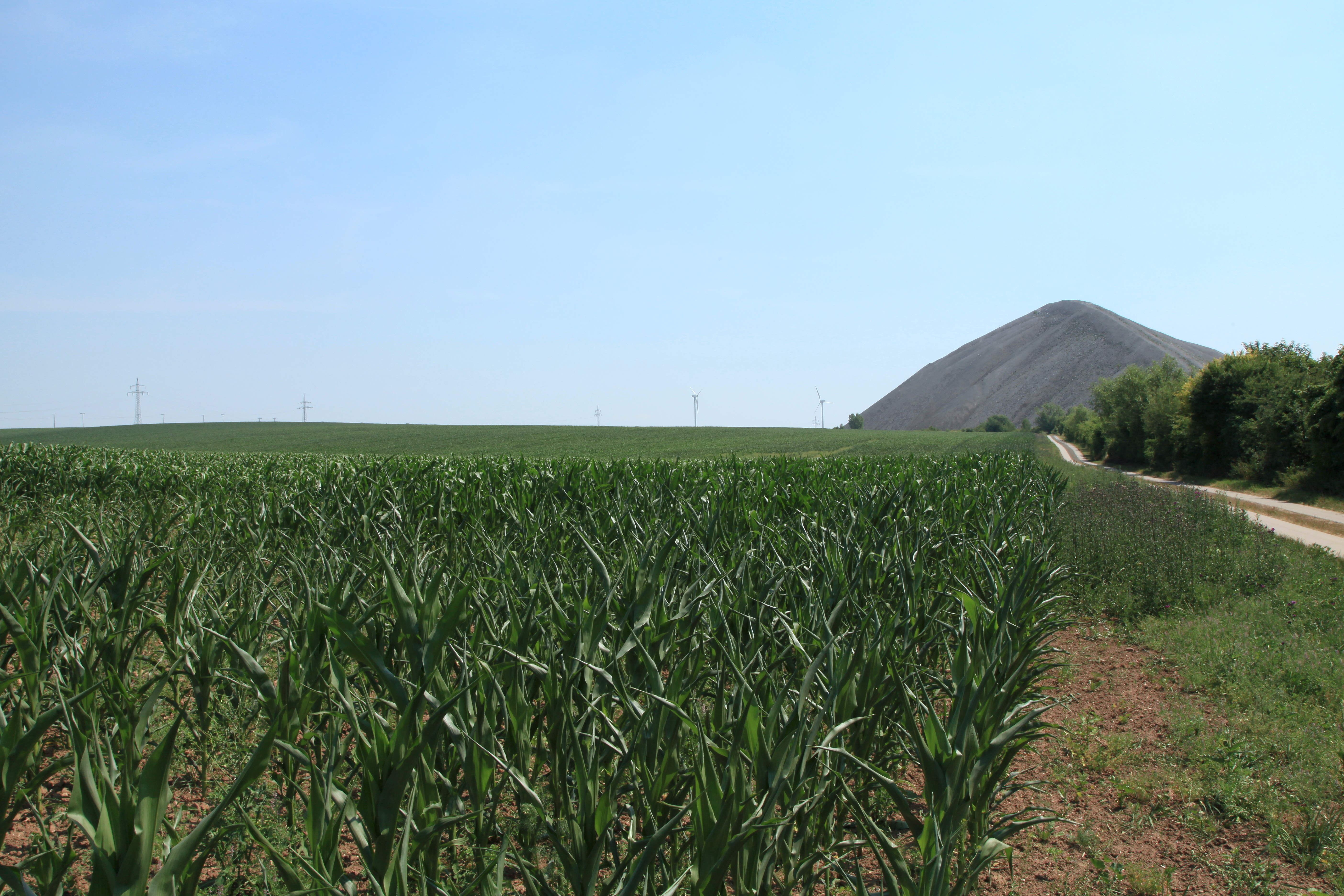 Verbliebene Halde der Schachtanlage Bernard Koenen Schacht Niederröblingen (Schacht 1), Einzinger Landstraße in Niederröblingen, Allstedt